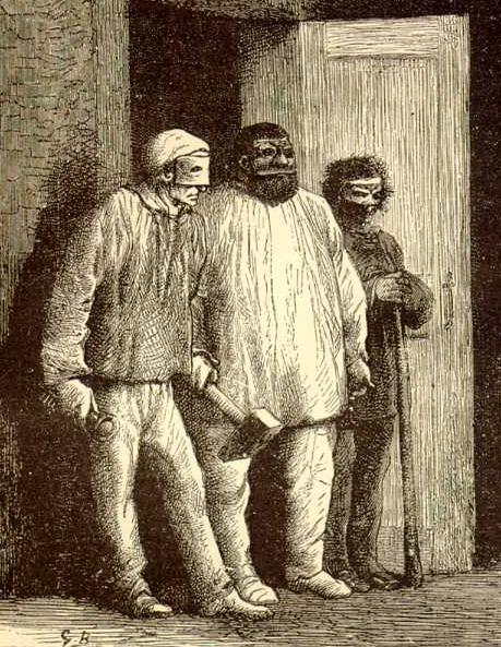 Masqués et revêtus de blouses d'ouvriers, les membres de la bande criminelle Patron-Minette assistent les Thénardier lors du guet-apens monté contre Jean Valjean.